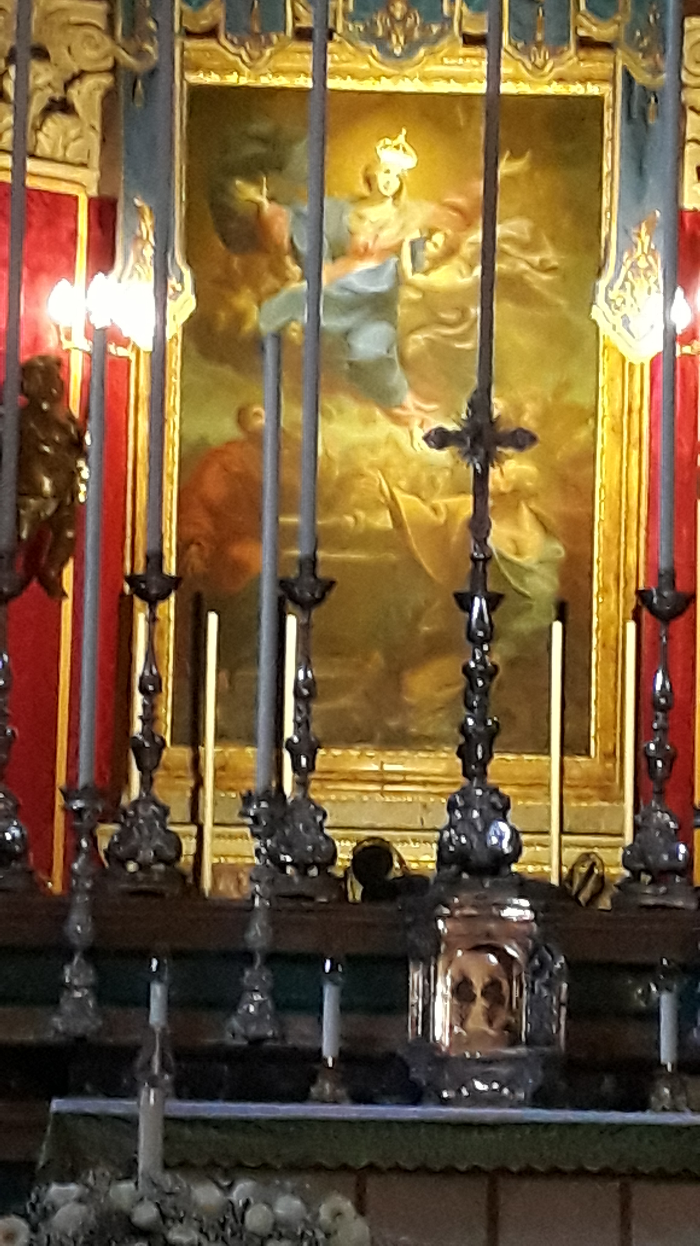 Obraz tytularny katedry Wniebowstąpienia na Gozo, Malta; jego autorem jest Michele Basuttil, wykonany 1791.